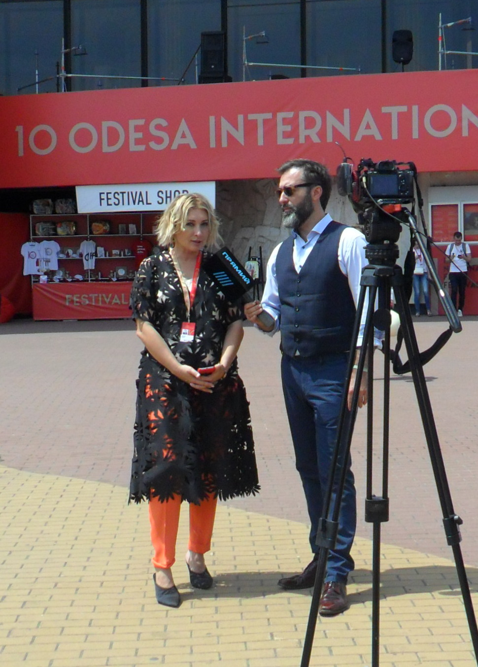 Президент Одеського міжнародного кінофестивалю Вікторія Тігіпко на 10-му ОМКФ. Одеса, Фестивальний палац, 15 липня 2019.